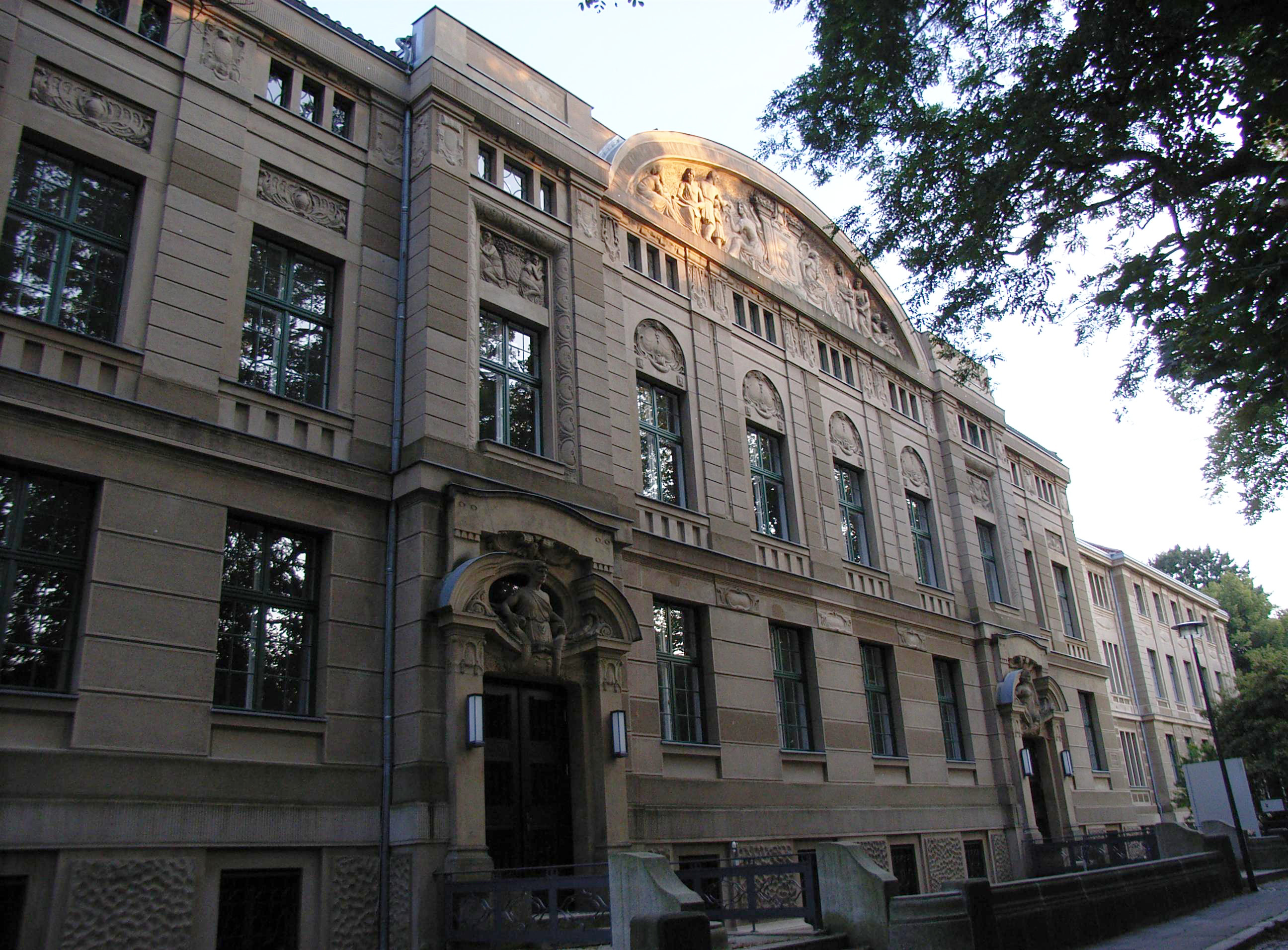 Hauptgebäude der Rothenburger Versicherung in Görlitz. Das Gebäude gehört heute zum Hochschulcampus Görlitz